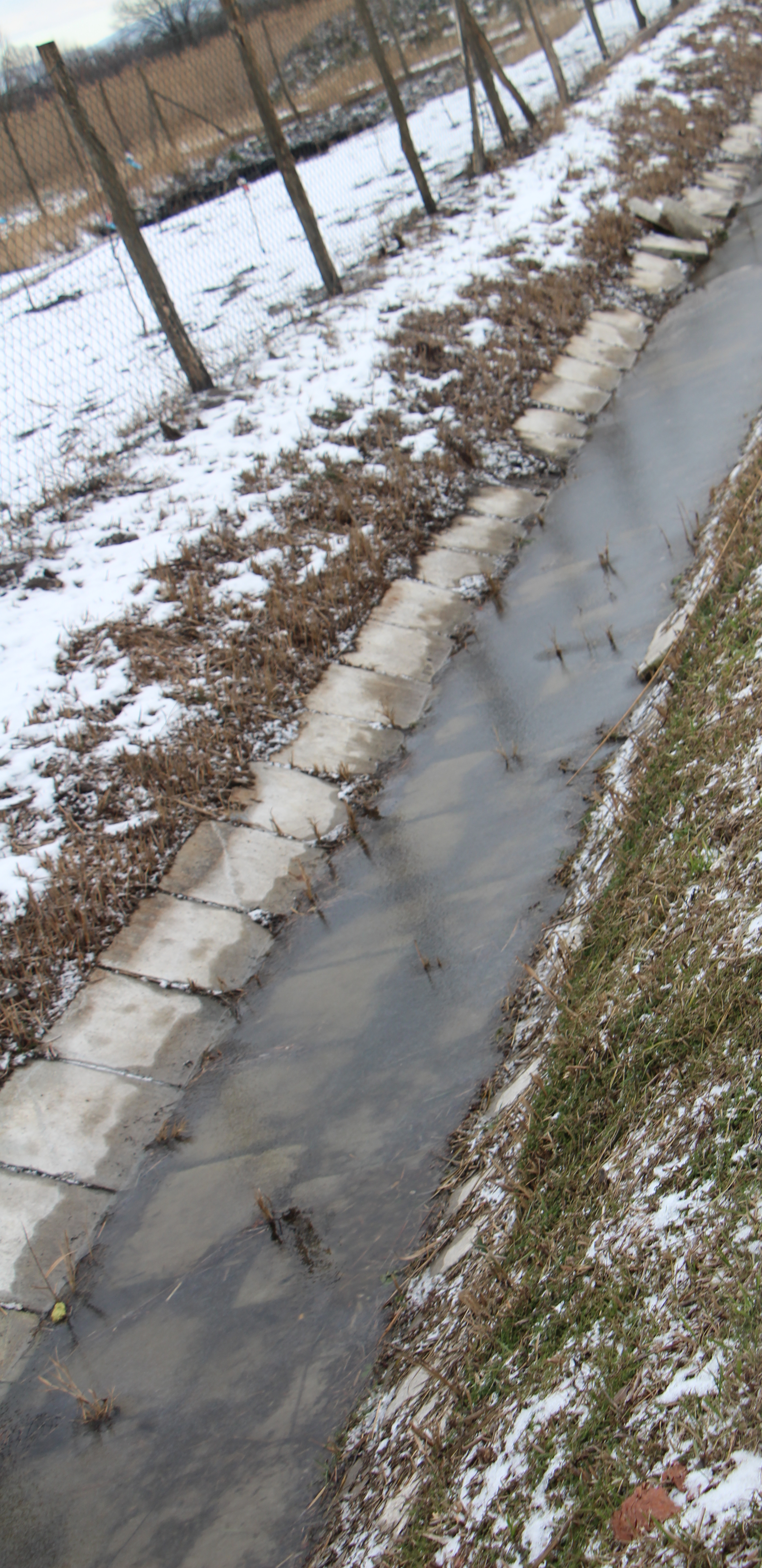 Vyčistený tok kanála severne od obce Jakubov